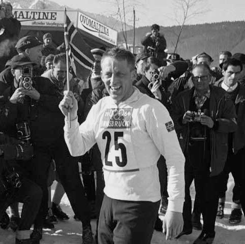 TORMOD KNUDSEN: Tok kombinertgull i Innsbruck i 1964.